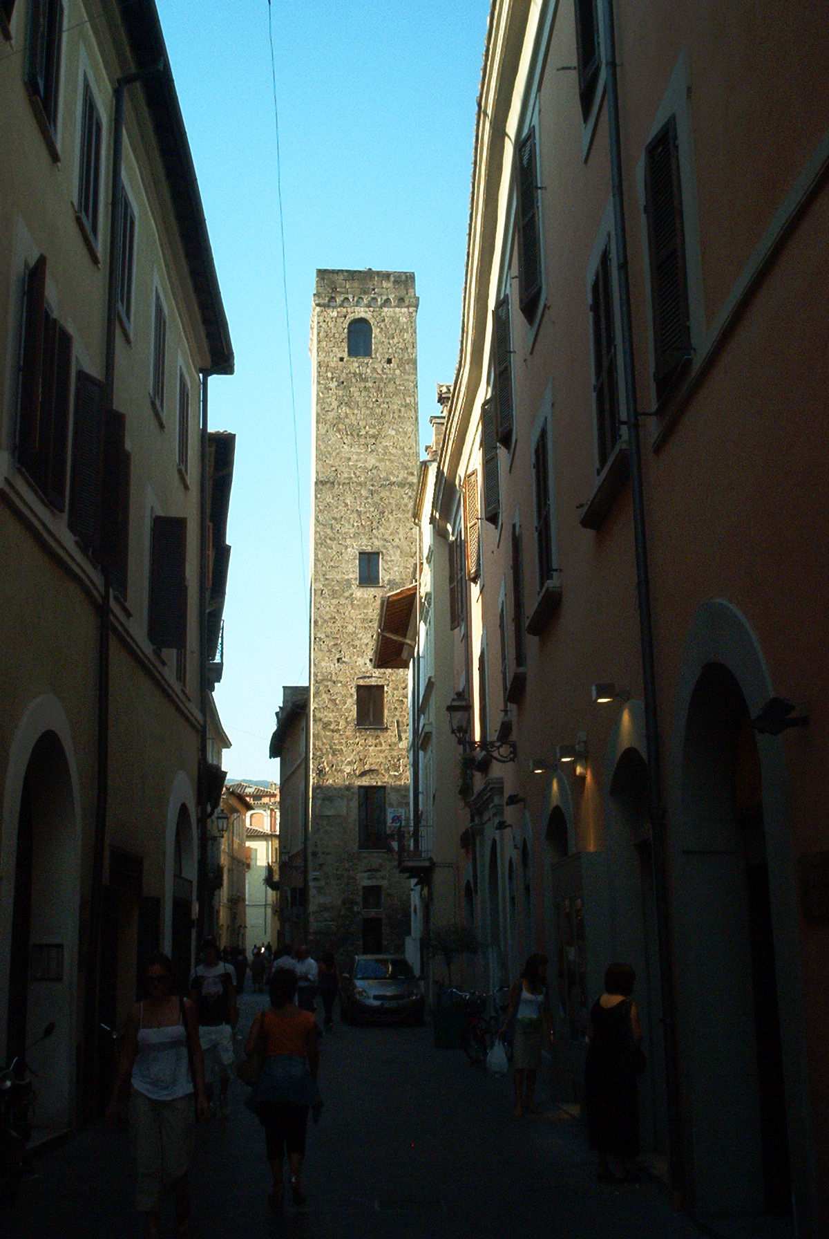 La Torre Barbarasa e la Via Roma, Terni.